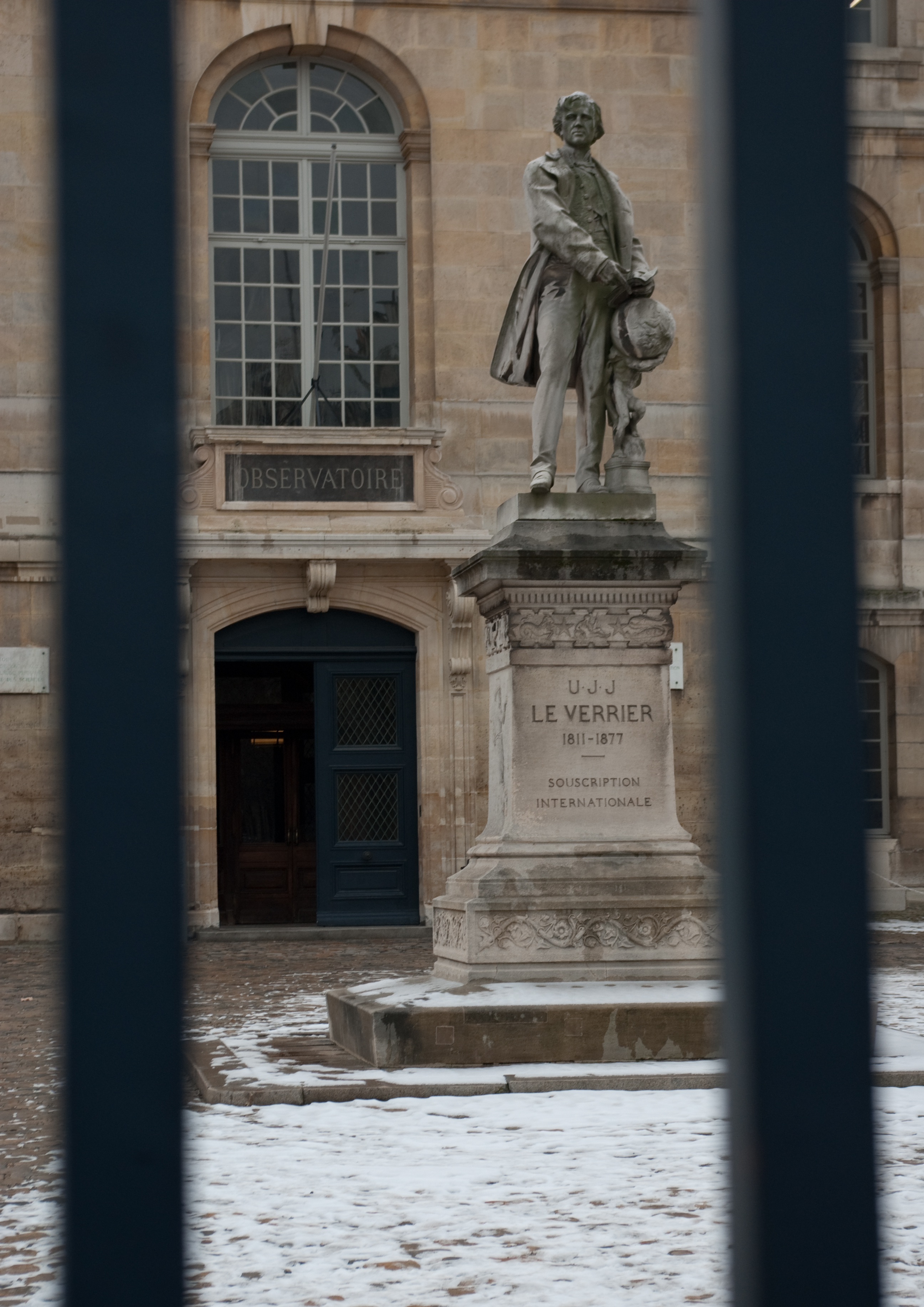 Henri Chapu (1833-1891), Monument à Urbain Le Verrier, 1889, Observatoire de Paris, façade nord.